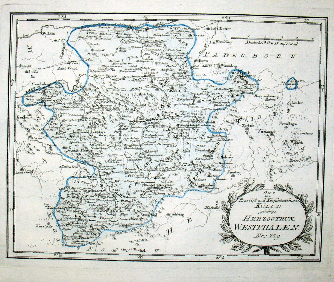 Das zum Erzstift und Kurfürstenthum Koelln gehörige Herzogthum Westphalen. Nro. 229. Kolorierter Kupferstich, Version mit kleinerer Ortsdichte